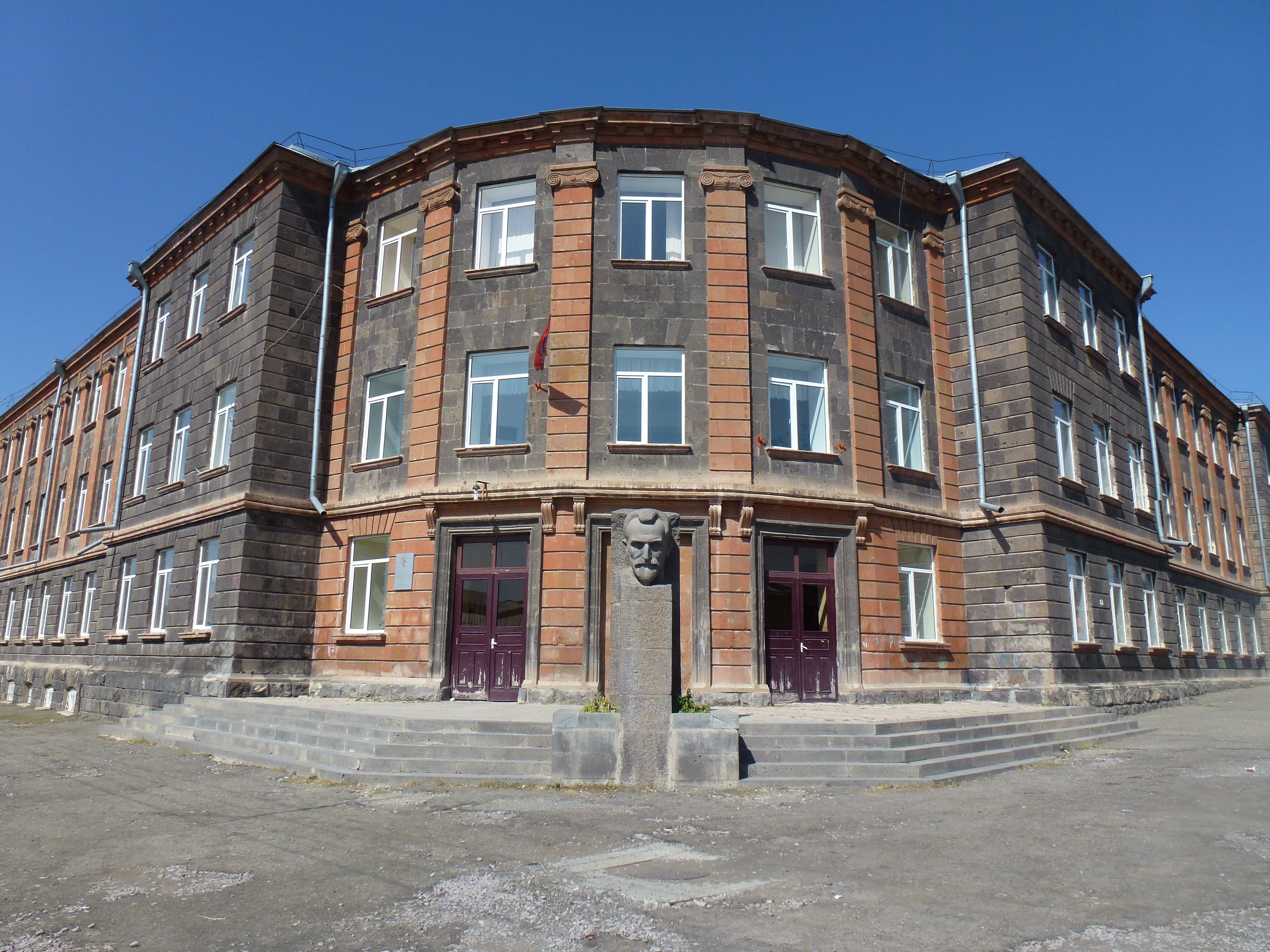 Շենք Գյումրիում 1/4.920